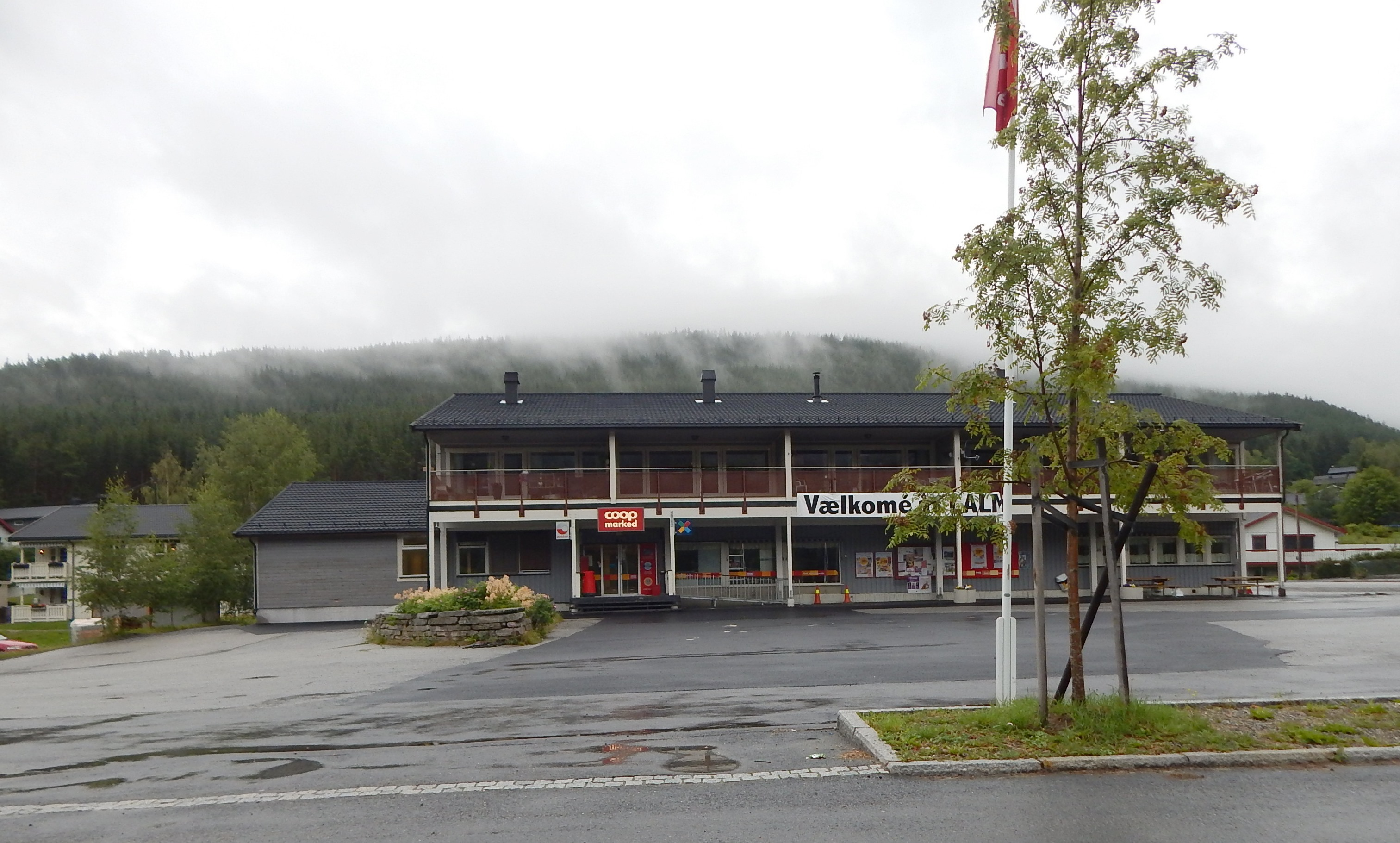 Coop-butikken på Lalm